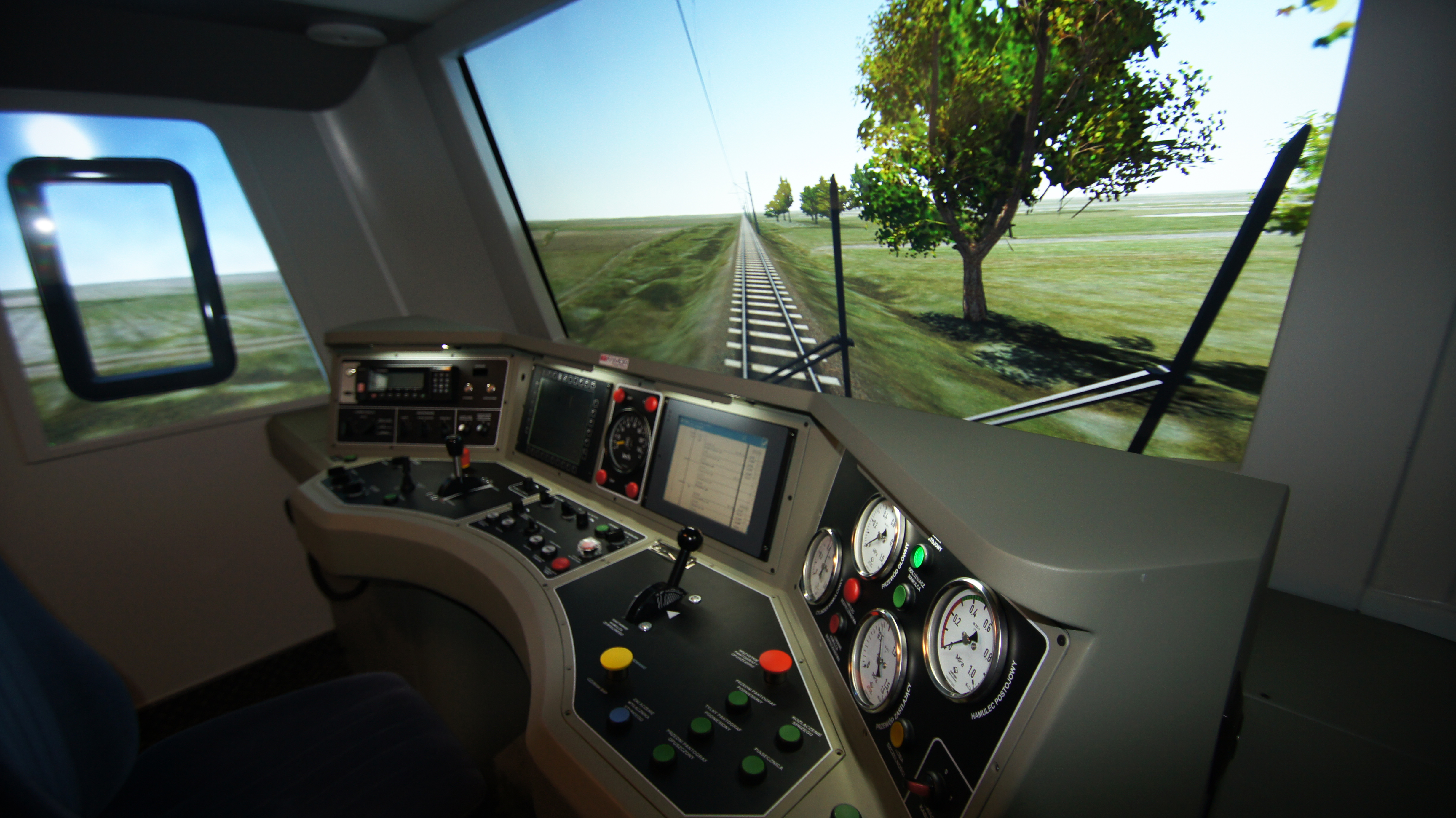 Kabina maszynisty symulatora lokomotywy SIMTRAQ